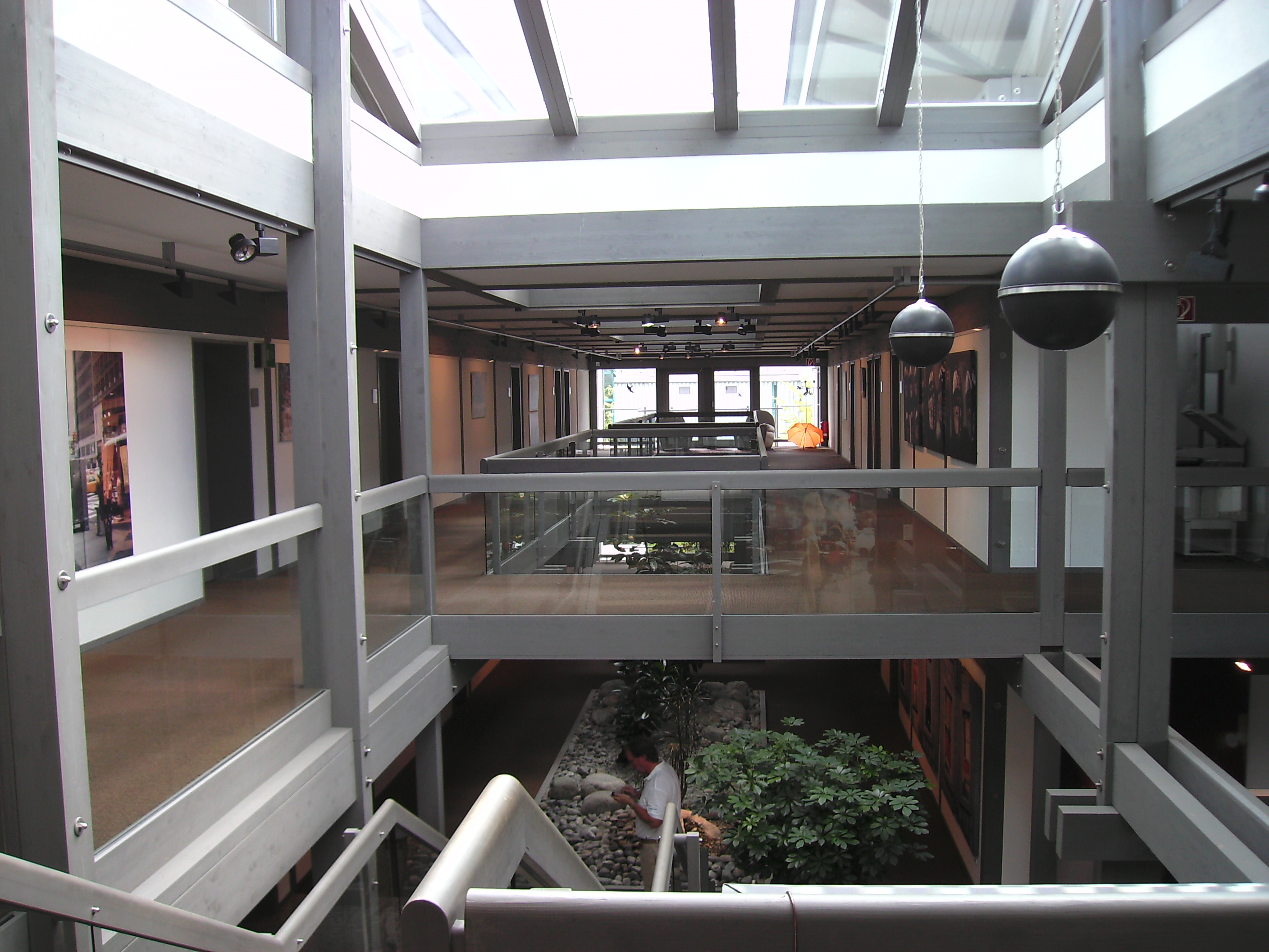 Kunstforum Leismann: Innenbereich (Galerie)